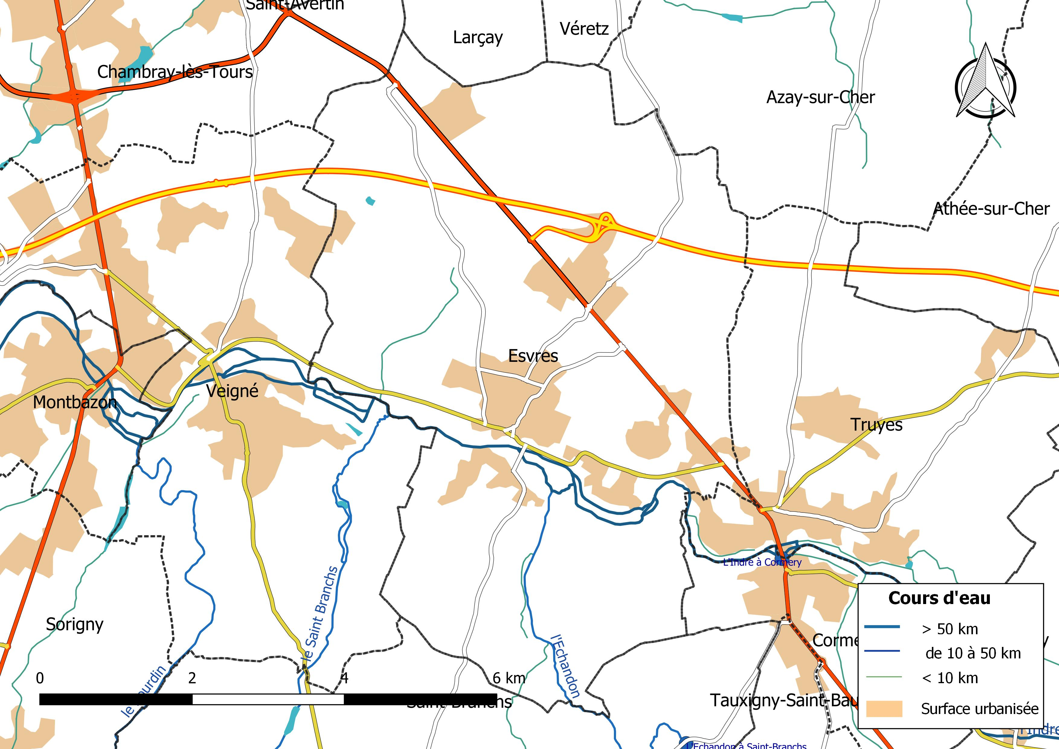 Carte du réseau hydrographique de la commune de Esvres (France).